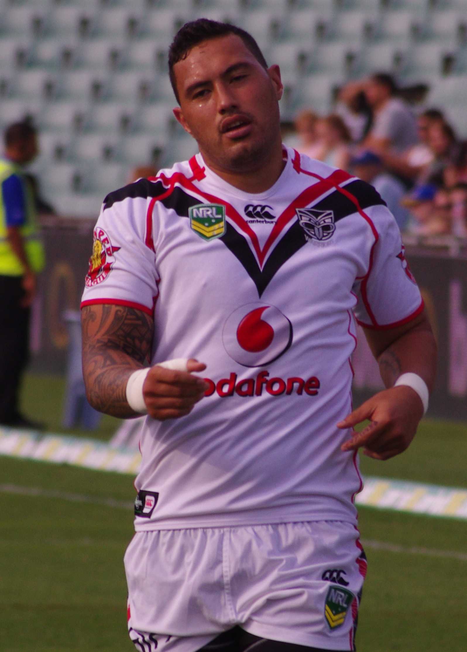 FELETI MATEO